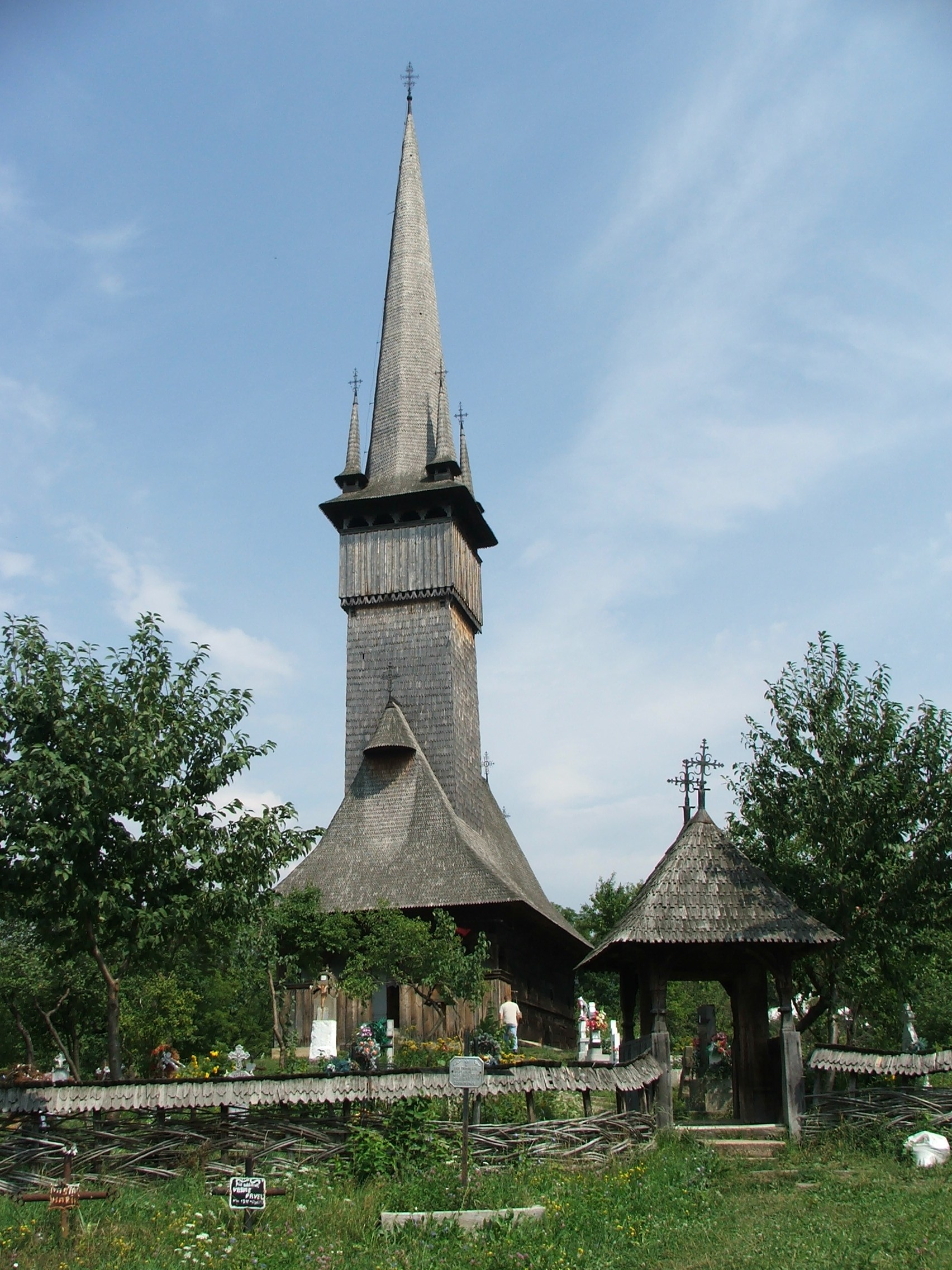 Nyárfás, görög katolikus fatemplom